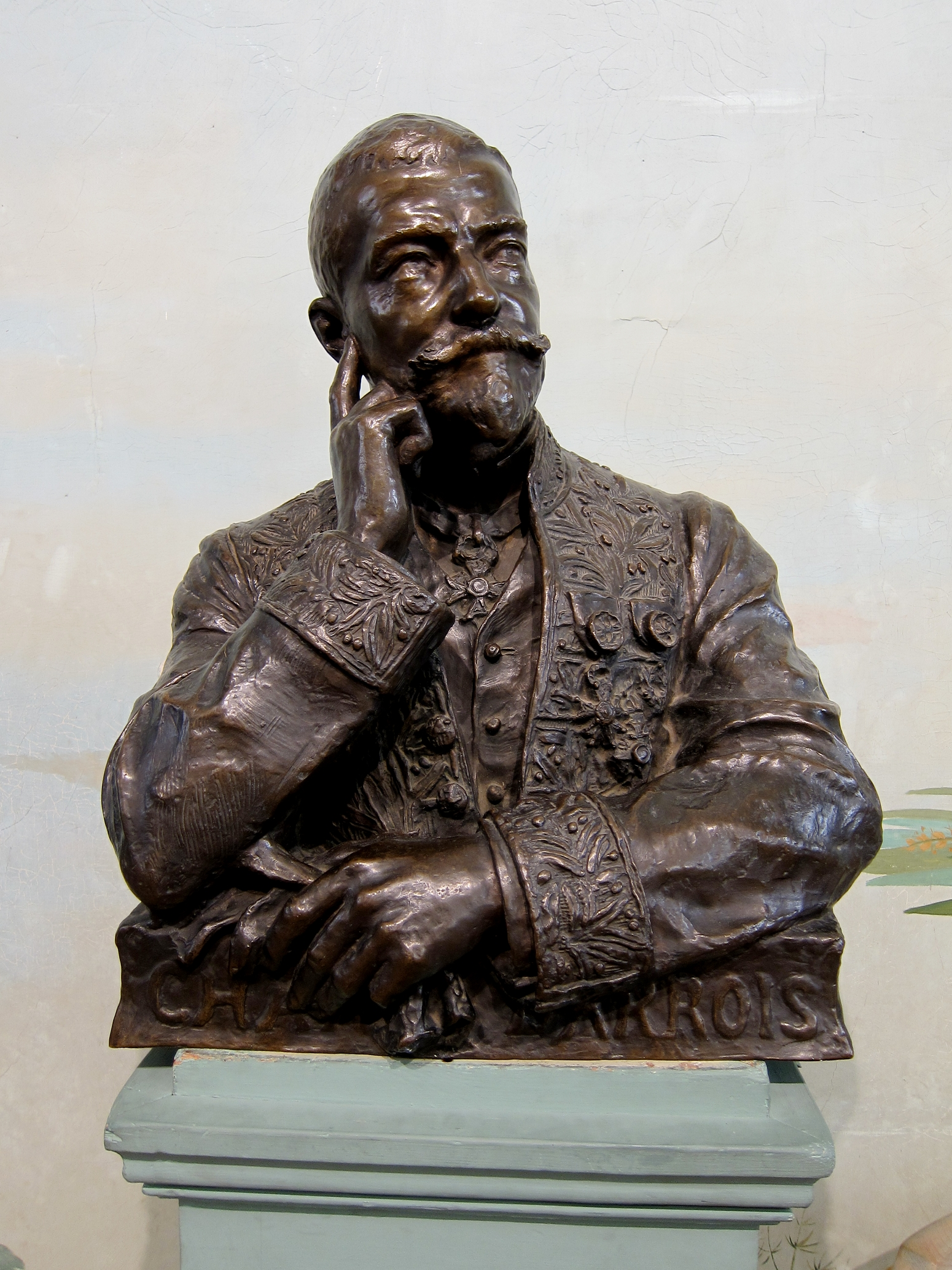 Buste de Charles Barrois au musée d'histoire naturelle de Lille (Nord).